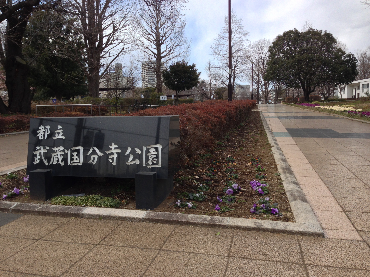 国分寺市にある「武蔵国分寺公園」の泉地区入口